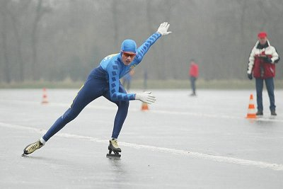 Kortebaanschaatsen